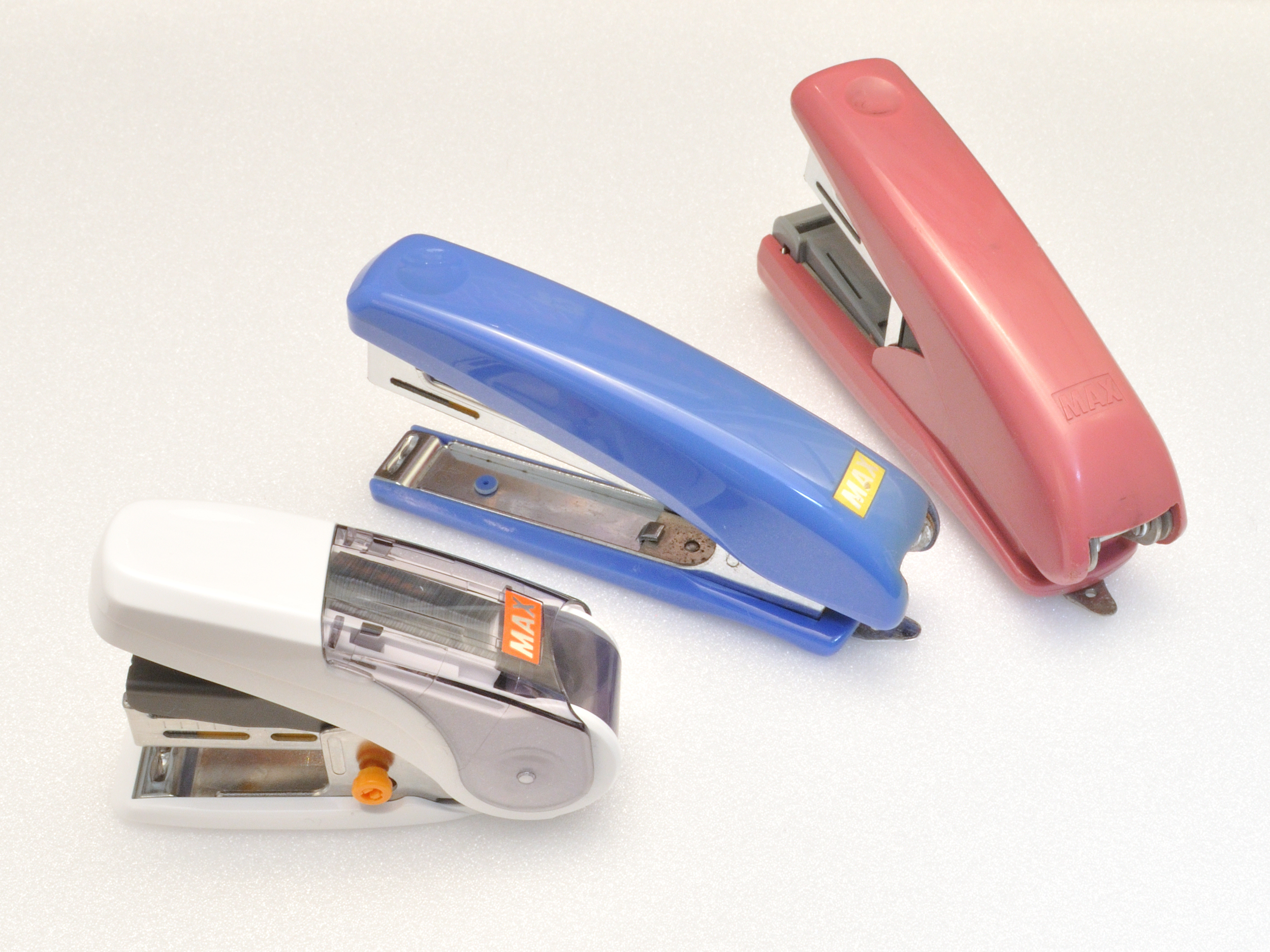 MAXのホッチキス、ステイプラー